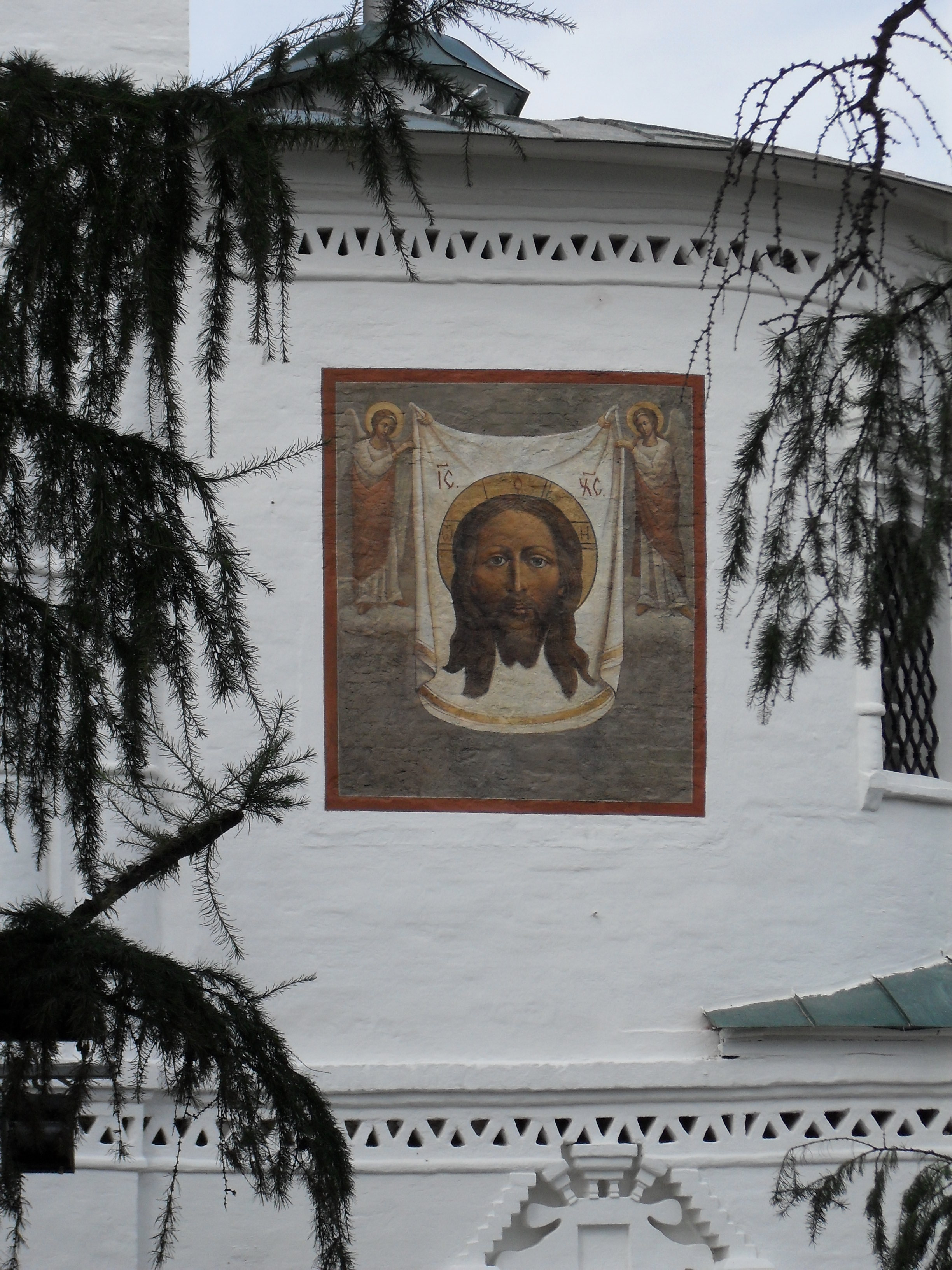 Спасская церковь